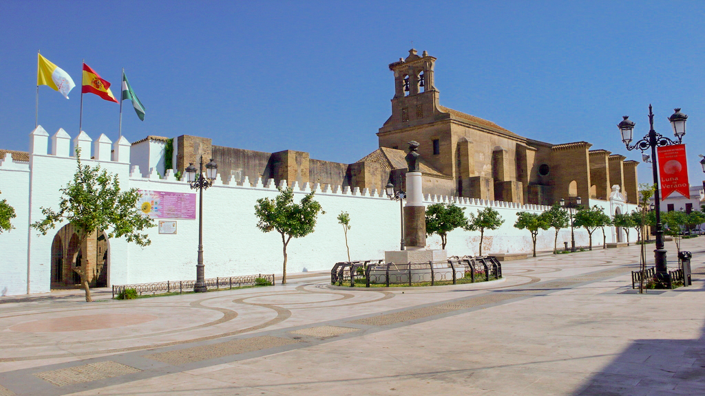 Vista exterior del Monasterio de Santa Clara (Moguer) por la Plaza de las Monjas